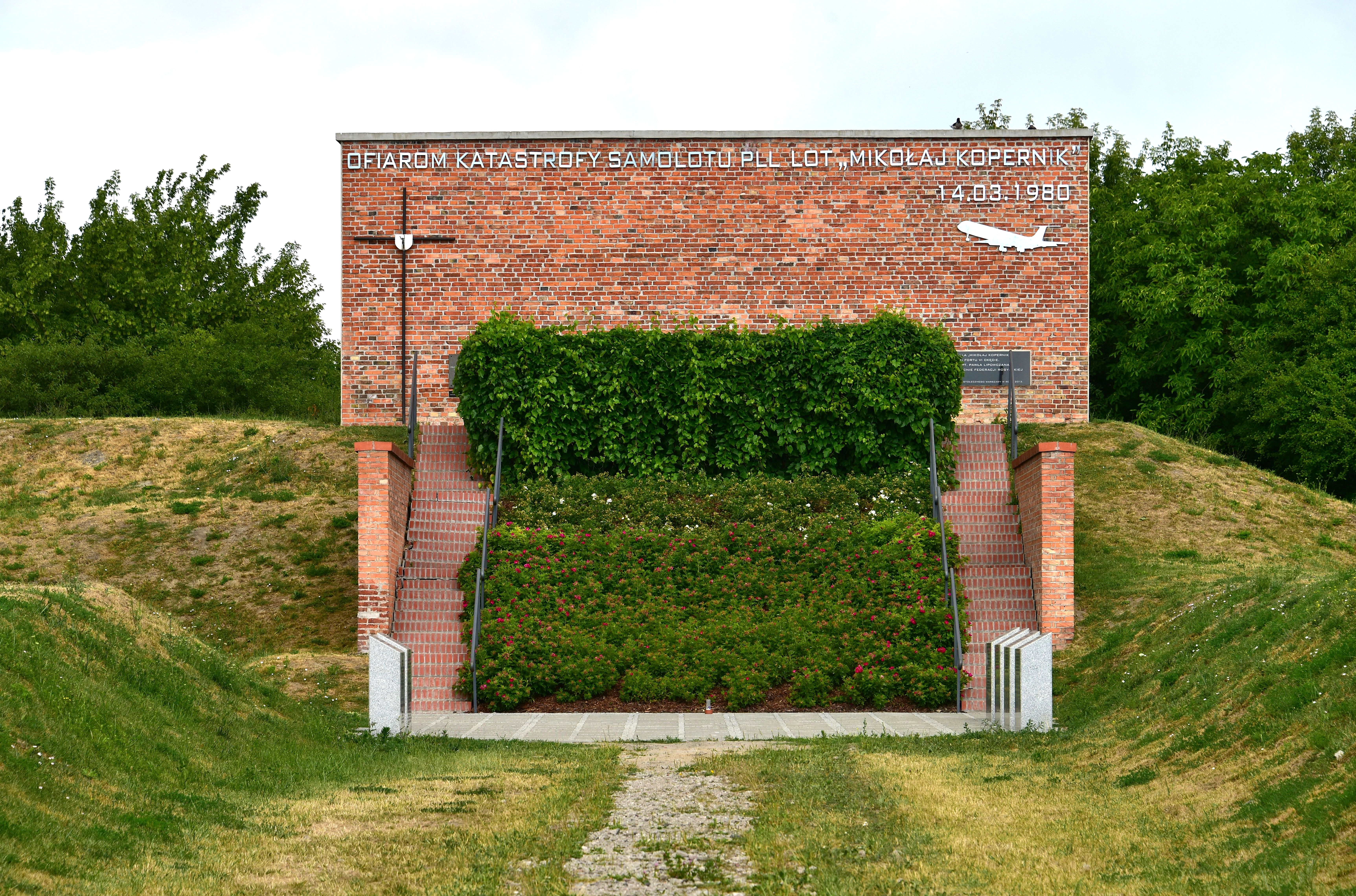 Pomnik ofiar lotu PLL LOT 007 "Mikołaj Kopernik" przy ul. Pawła Lipowczana (przy forcie Okęcie)